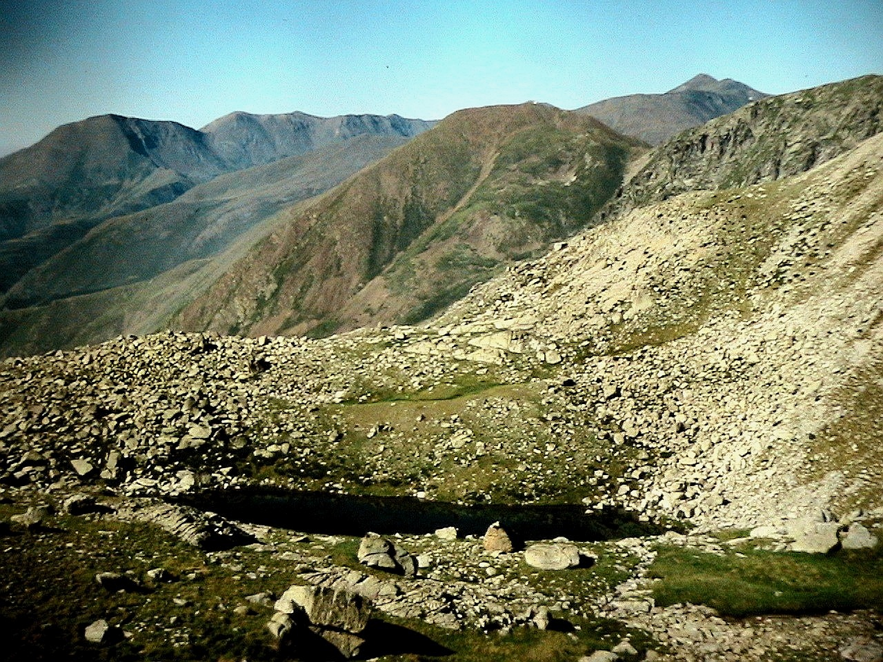 Estany Xic de Colomina, a Cabdella. La Torre de Cabdella (Pallars Jussà - Catalunya). Foto presa de la projecció d'una diapositiva